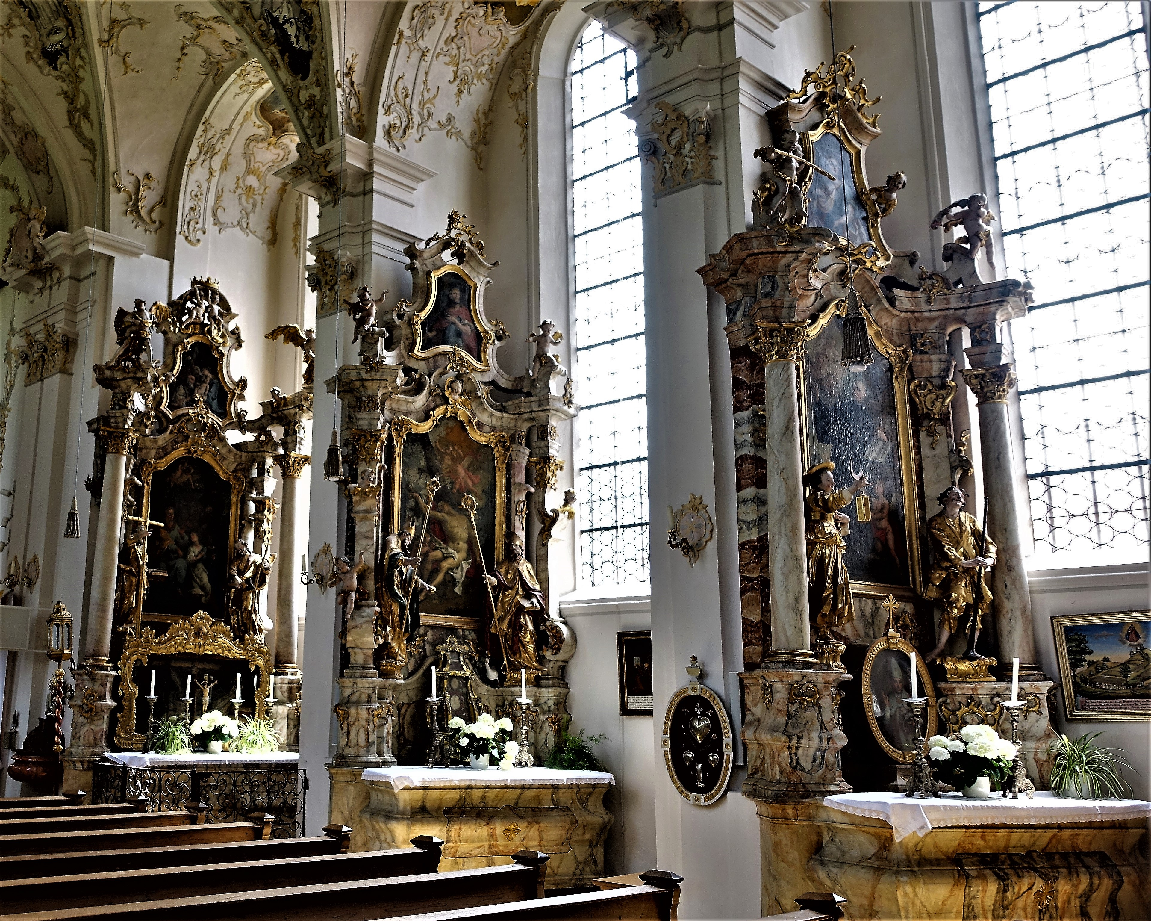 Blick auf die rechten Rokkoko-Seitenaltäre von Wallfahrtskirche Maria ThalheimThis is a photograph of an architectural monument.